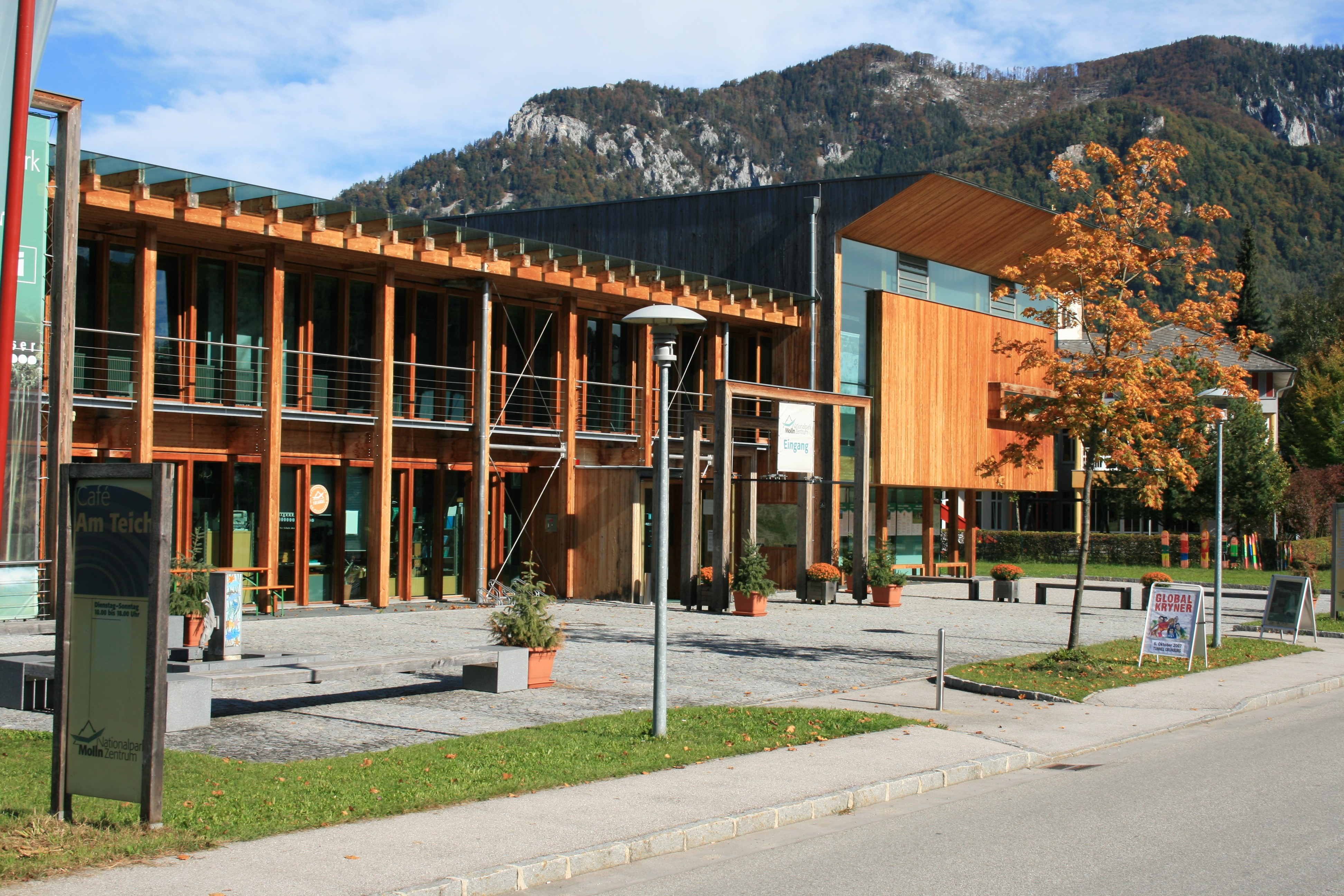 Das im Jahr 2001 eröffnete Nationalpark-Zentrum in Molln (Oberösterreich)